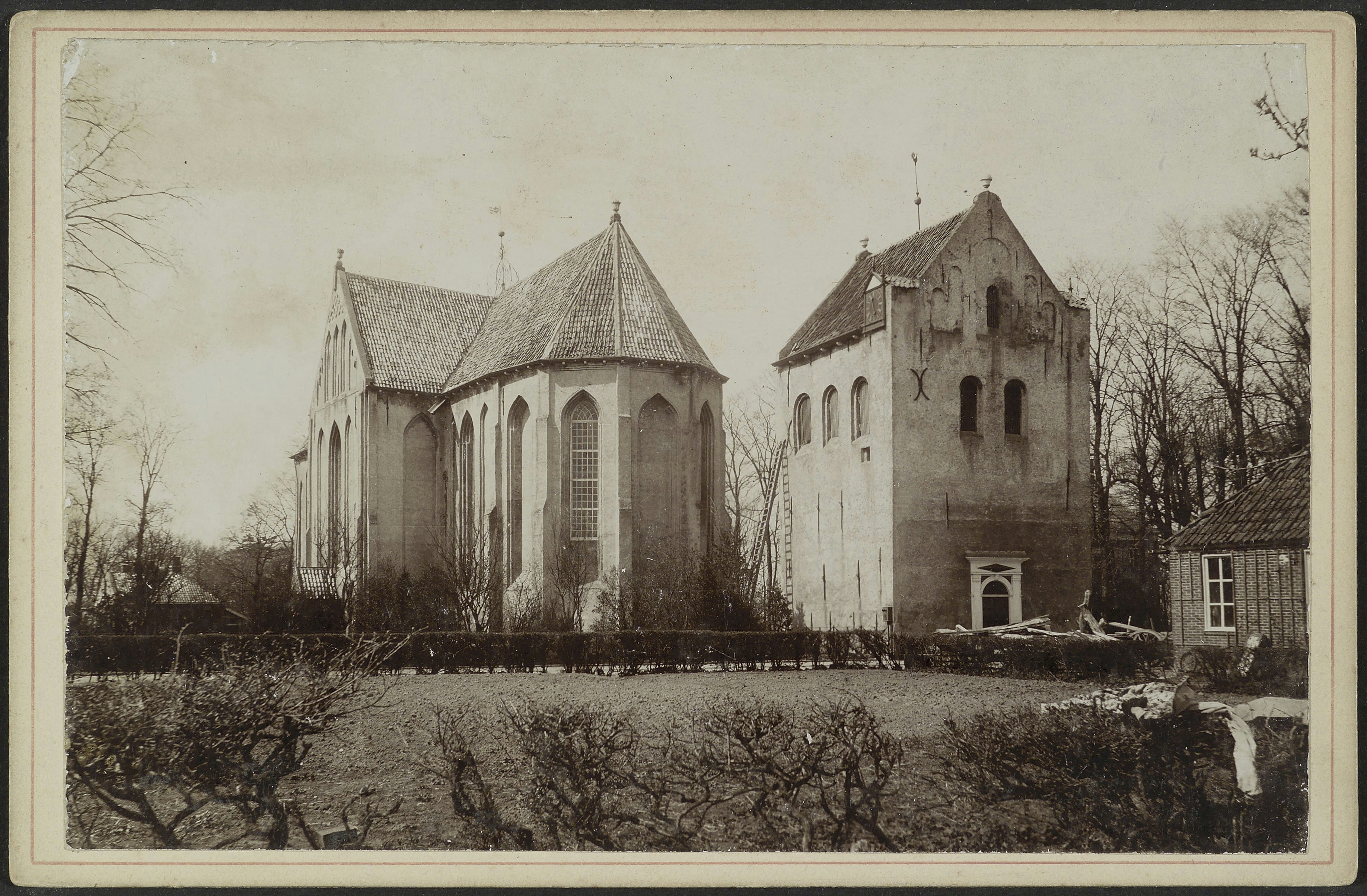 Nederlands Hervormde Kerk: Kerkzaal en toren gezien vanuit het oosten tijdens restauratie (opmerking: Kabinetfoto)